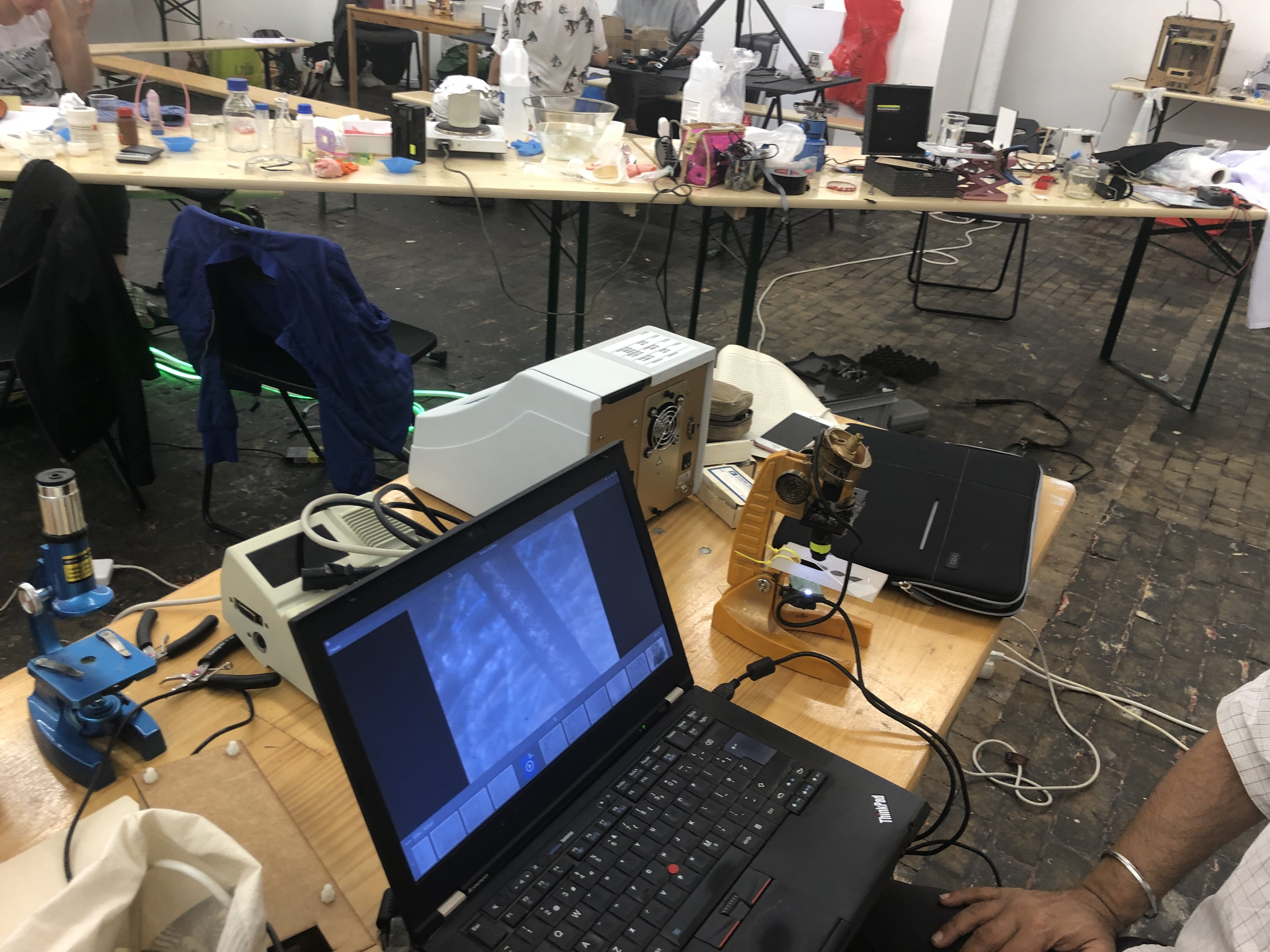 Wormolution, 1000 écologies 12 au 15 septembre 2019